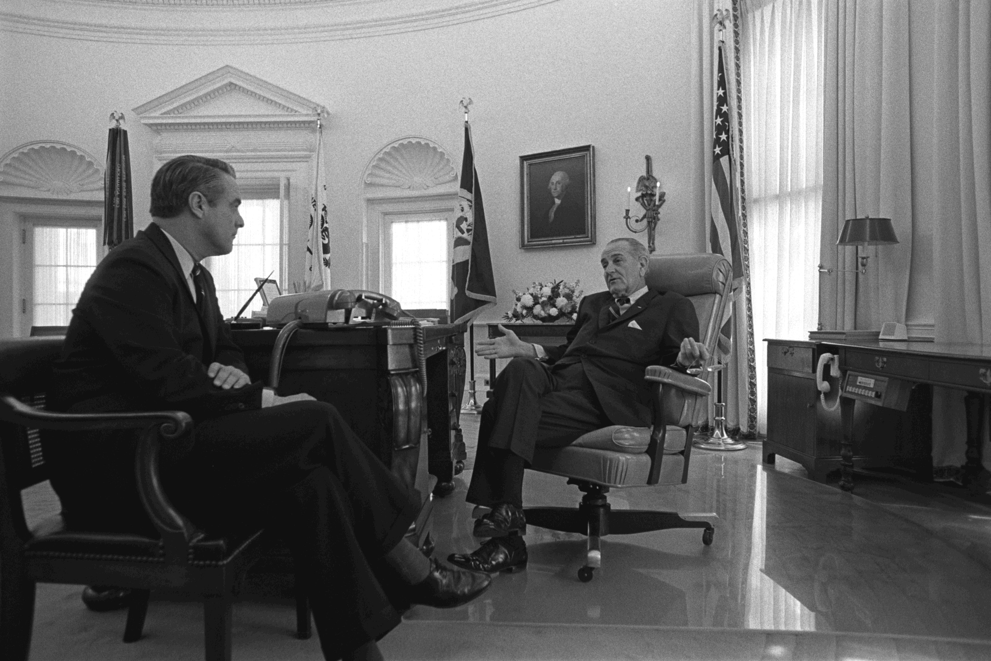 Sargent Shriver and President Lyndon Baines Johnson